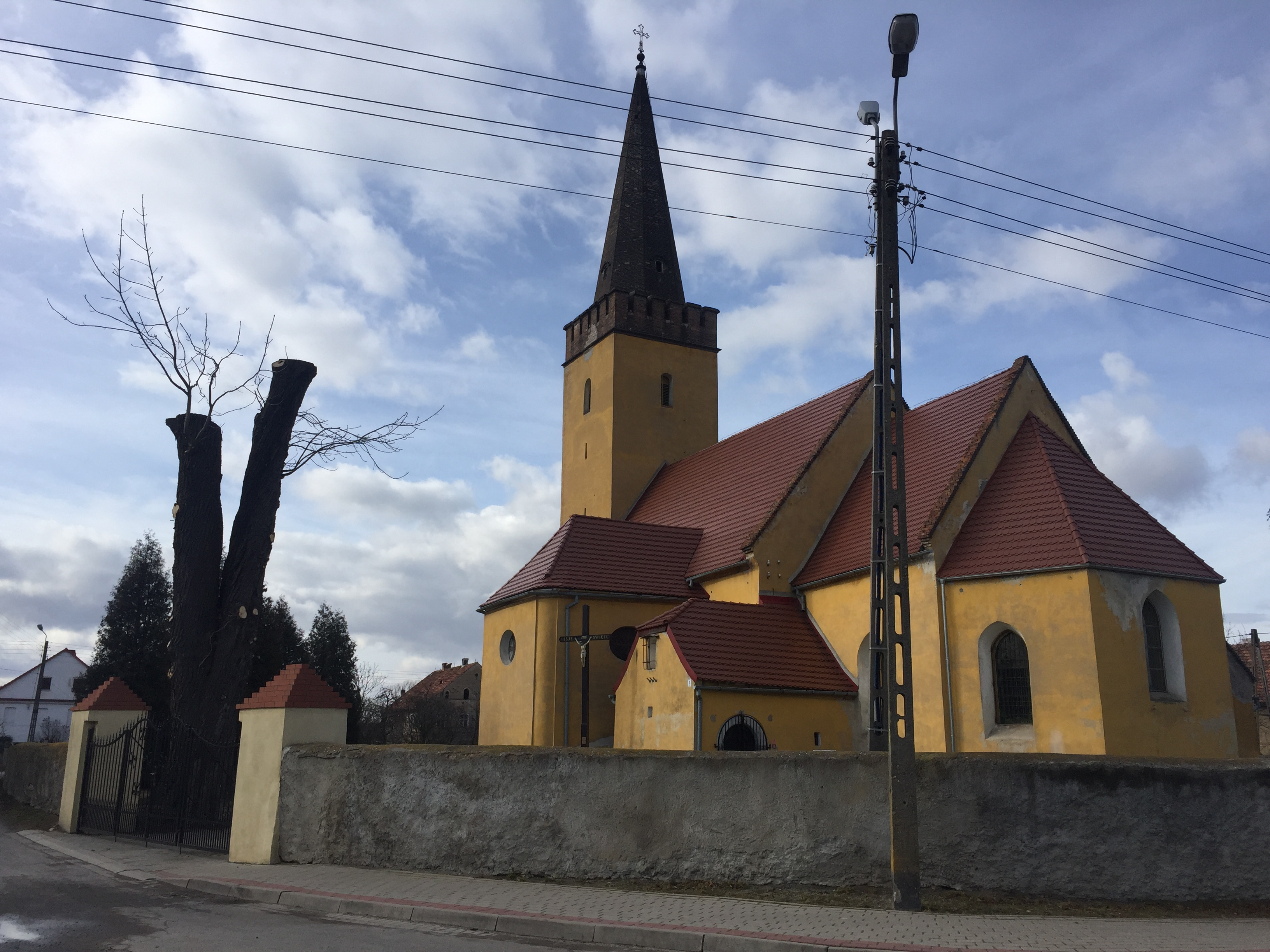 Kościół parafialny św. Stanisława Biskupa i Męczennika w Bukowie, 2017